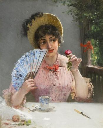 Dame mit Fächer